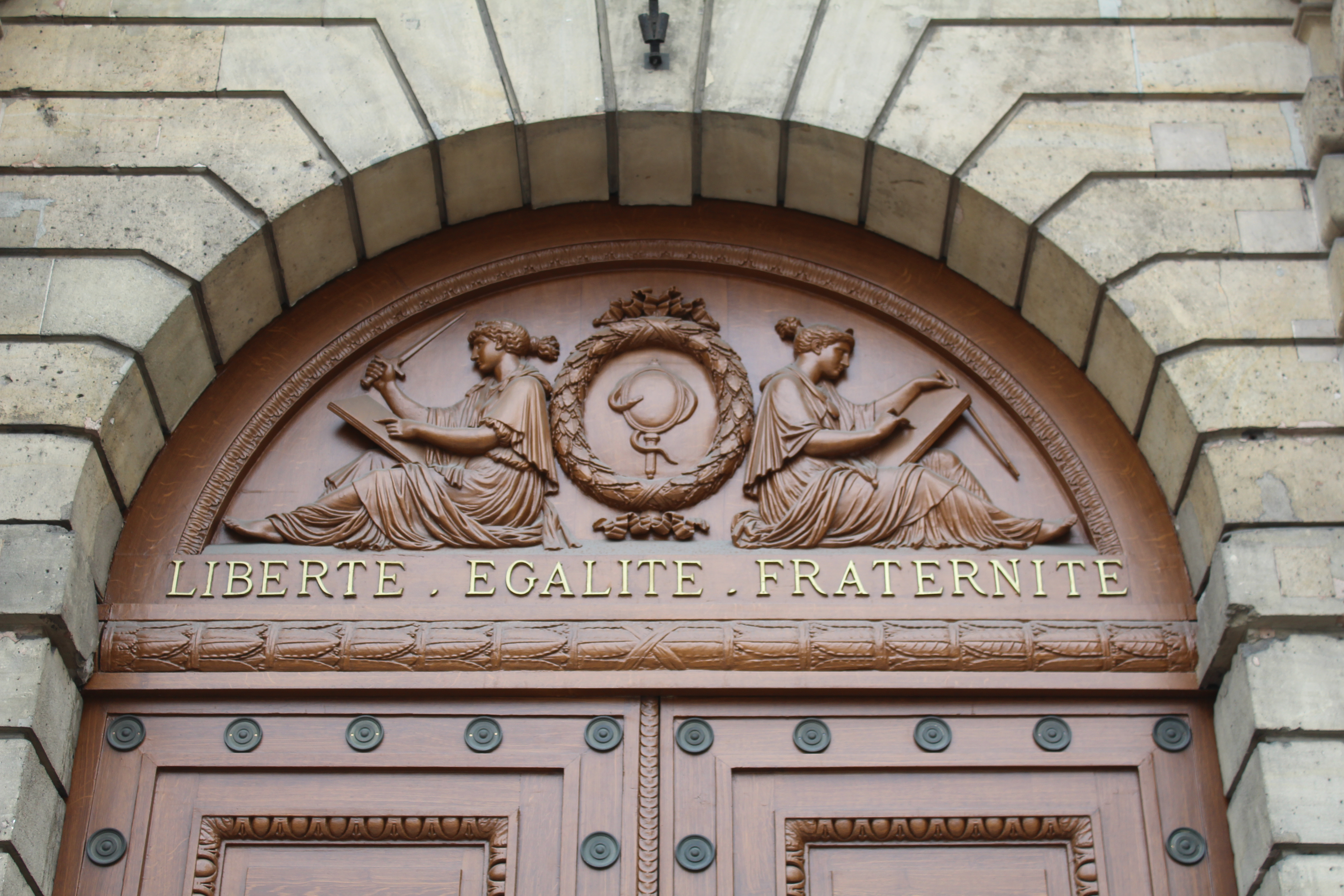 Porte d'entrée principale du palais du Luxembourg, Paris.